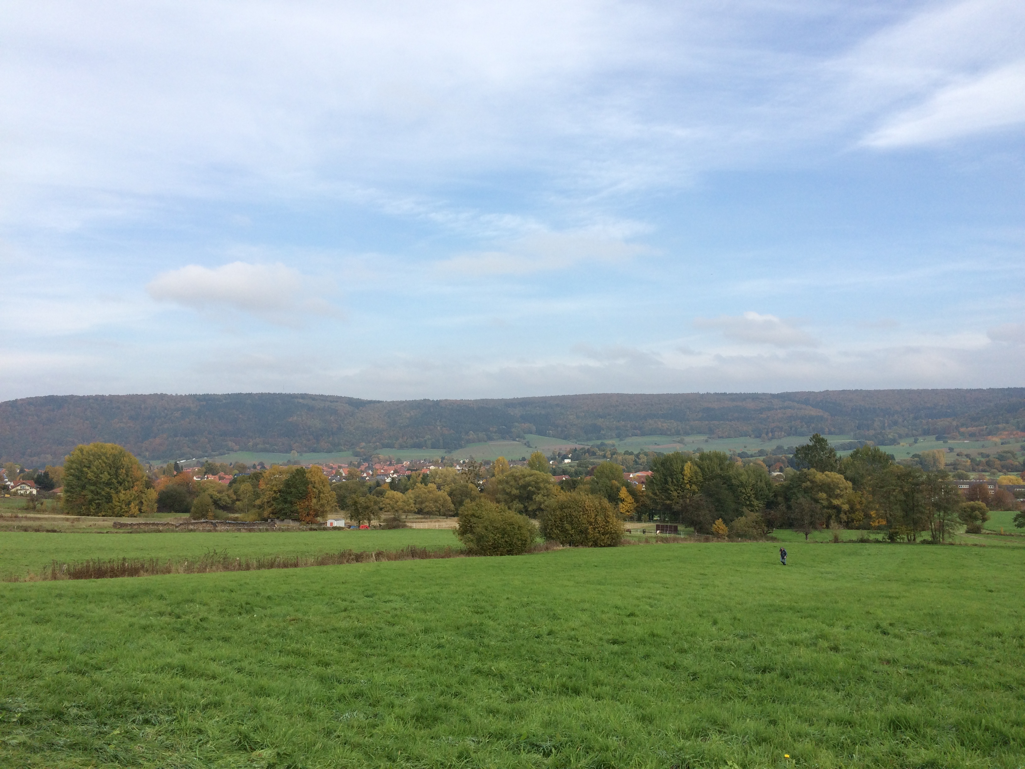 Blick von einem Feldweg oberhalb der Mittelpunktsportanlage Reinhardshagen in das Wesertal